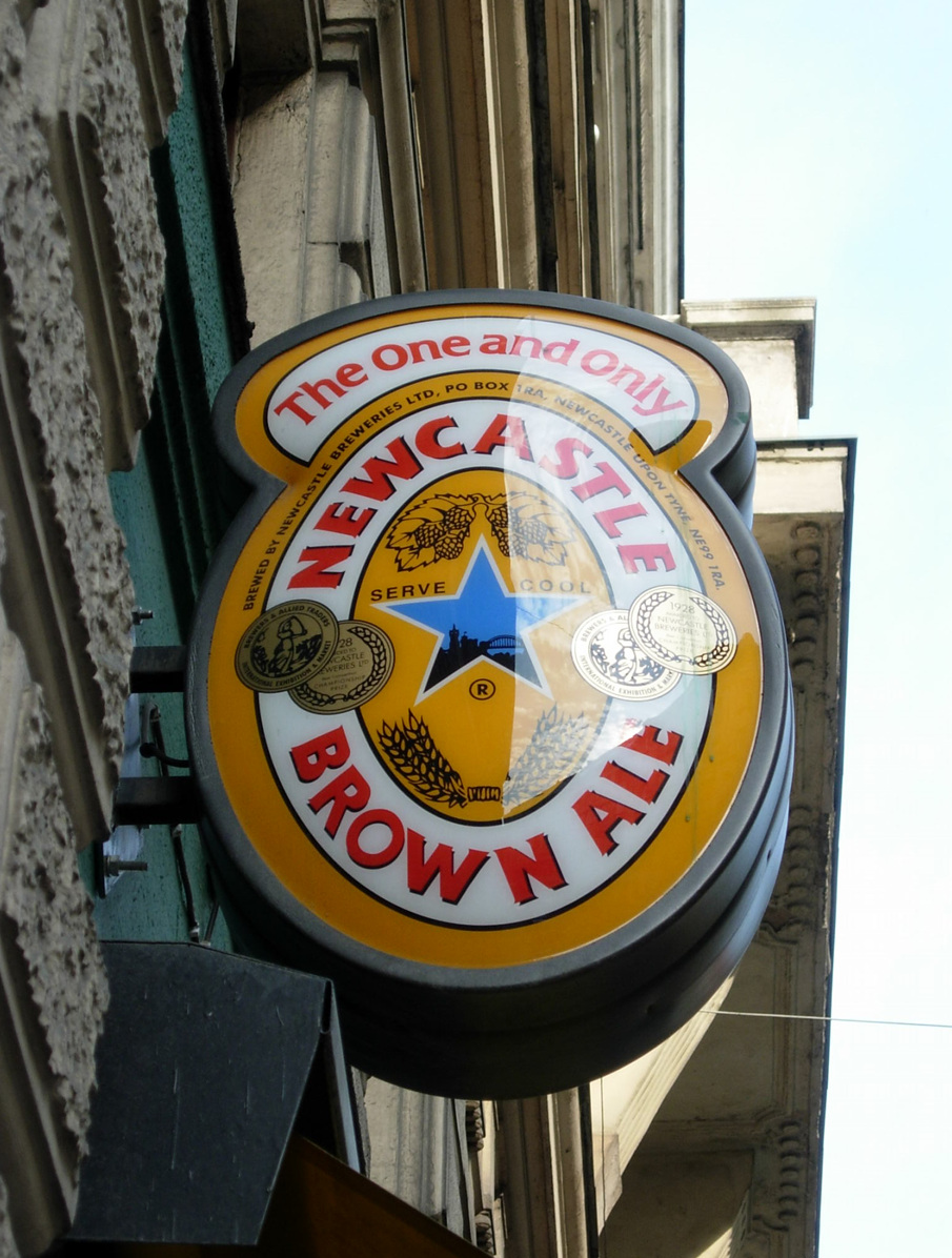 Bécs 600